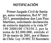 Notification